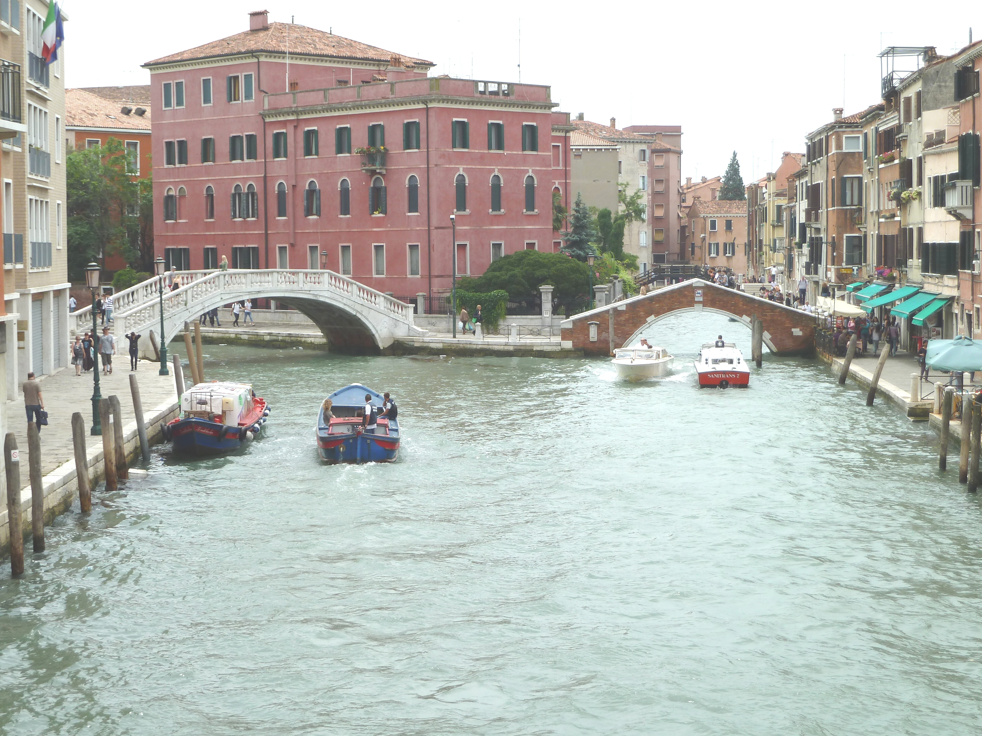 Rio Novo